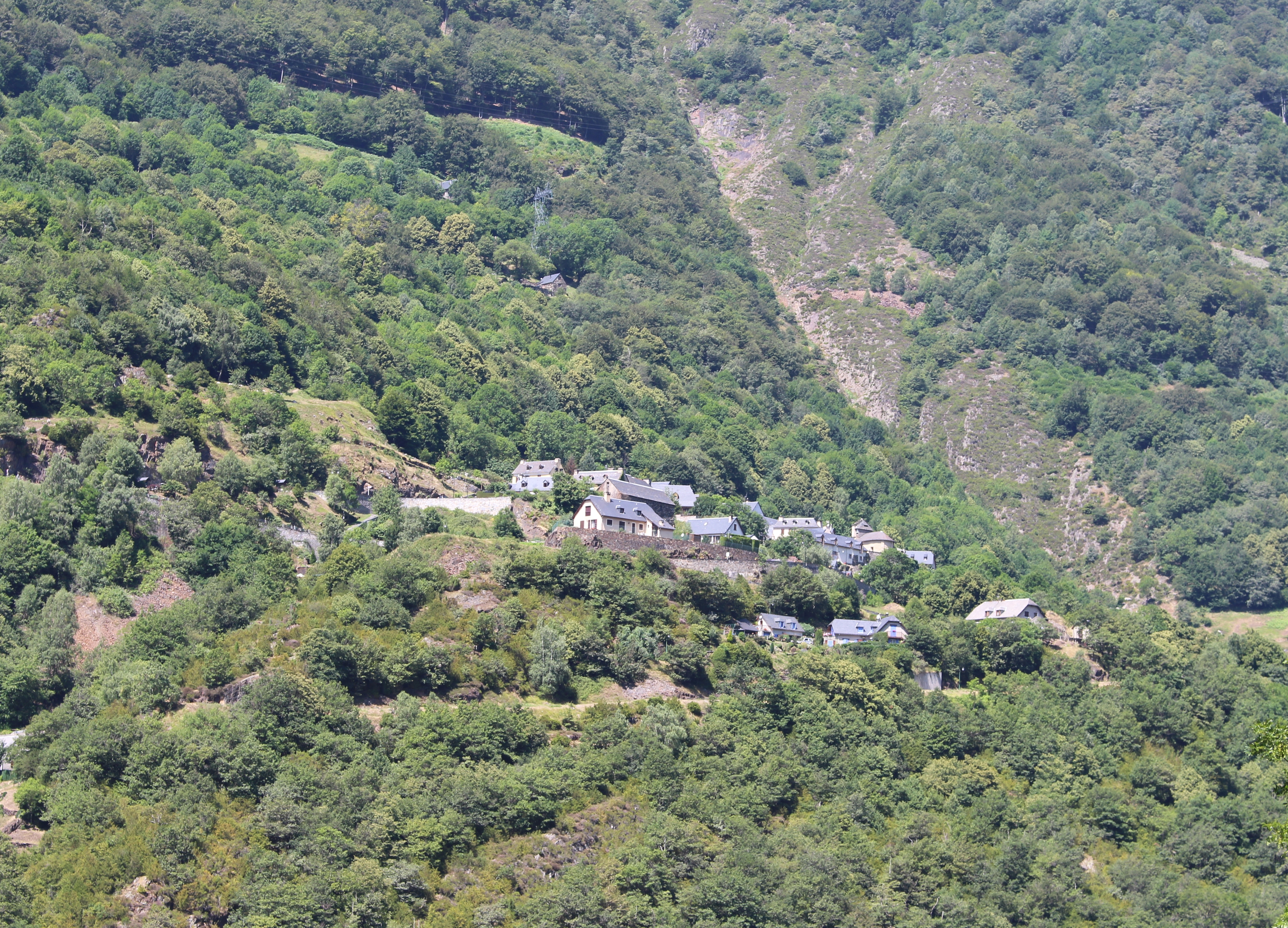 Viscos (Hautes-Pyrénées)